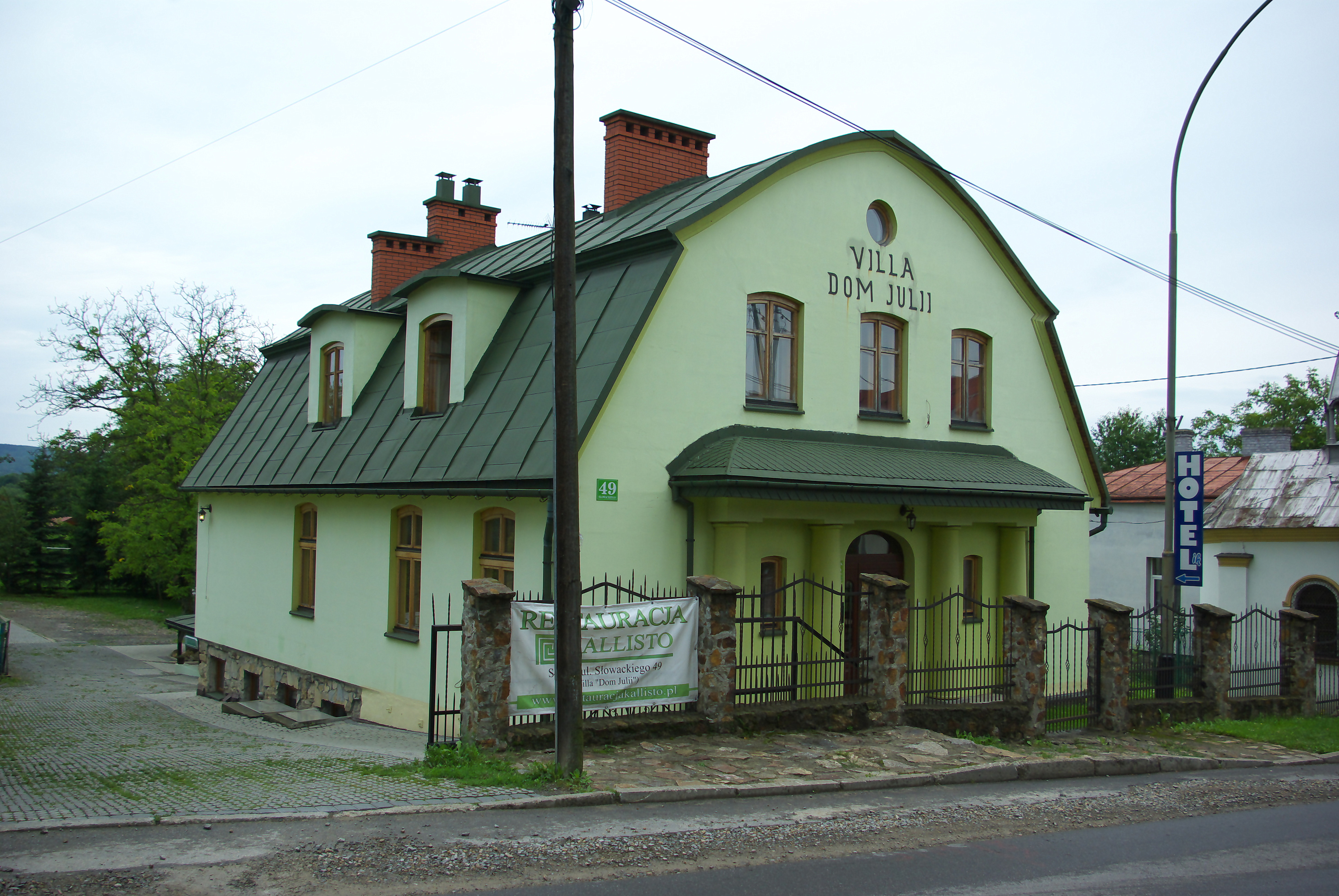 Villa Dom Julii w Sanoku